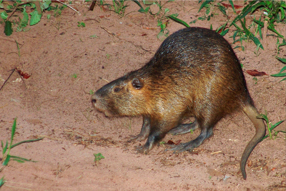 Ratao do banhado (Ratão do banhado) Filo: Chordata Classe: Mammalia Ordem: Rodentia Família: Myocastoridae Espécie: Myocastor coypus